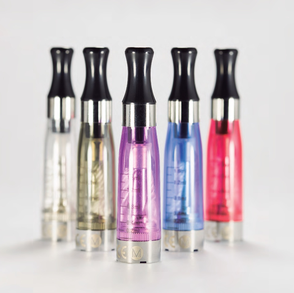 Atomizadores